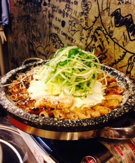 한국음식, 곱창